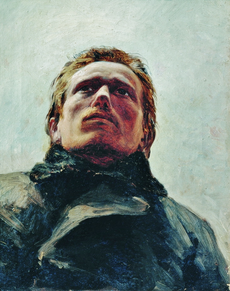 La testa del prigioniero, opera di Nikolaj Jarošenko